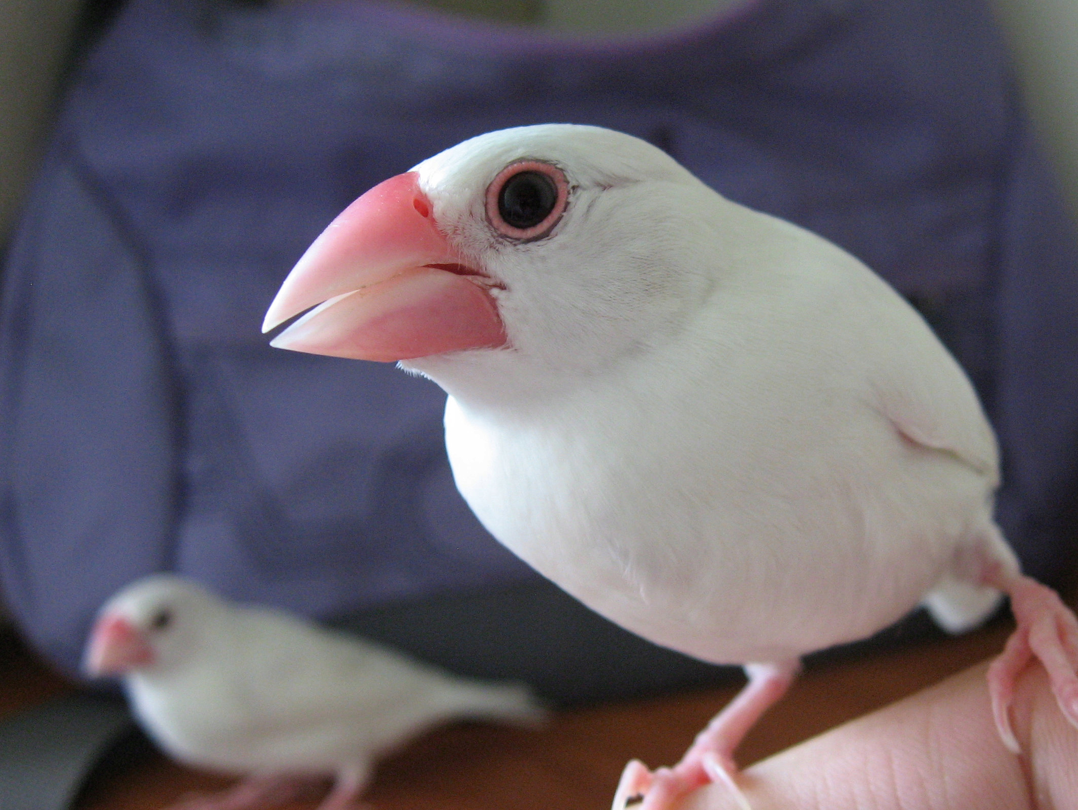 中文（台灣）: 白禾雀